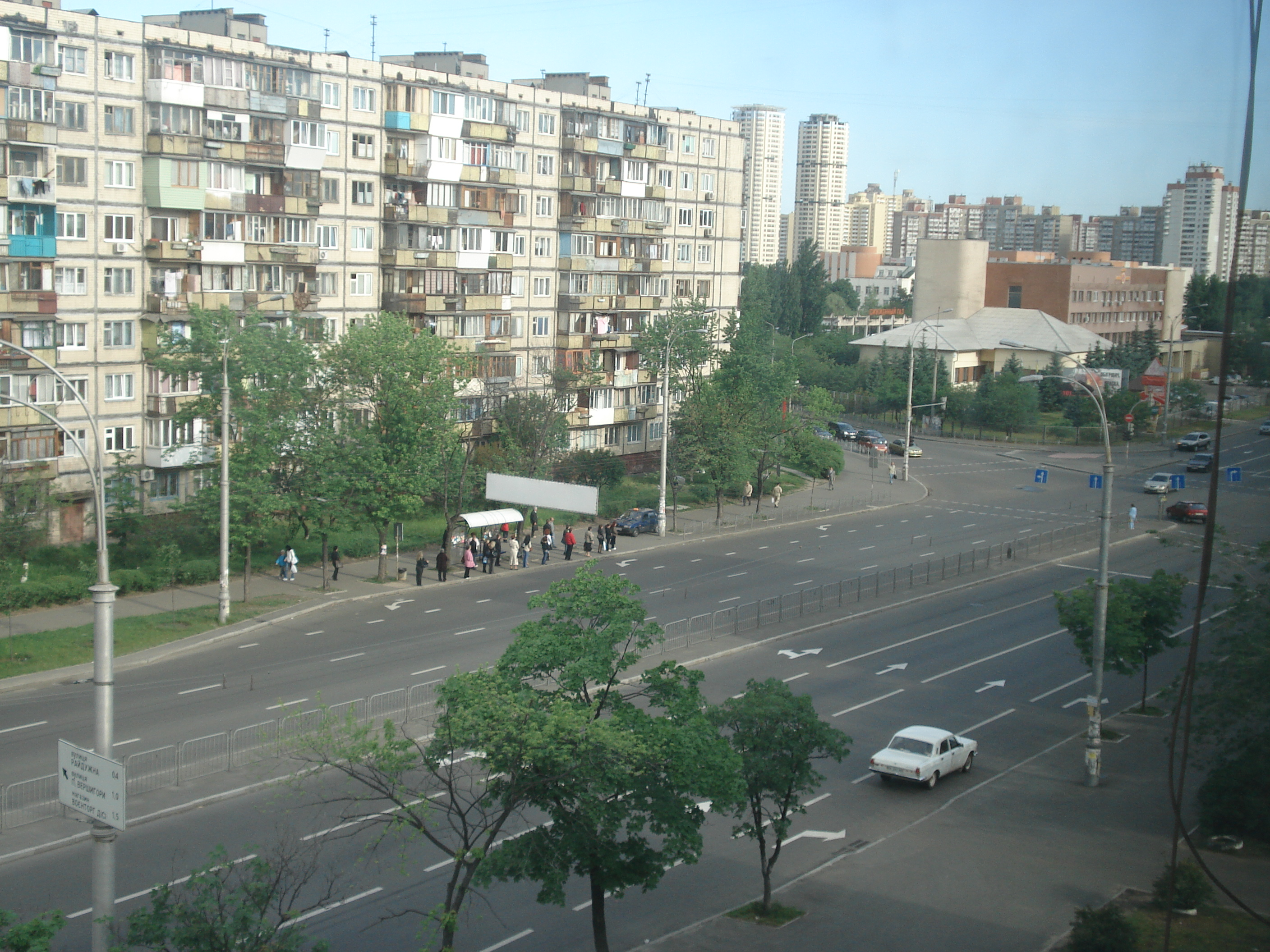 Бульвар Перова.: Воскресенка, Київ.